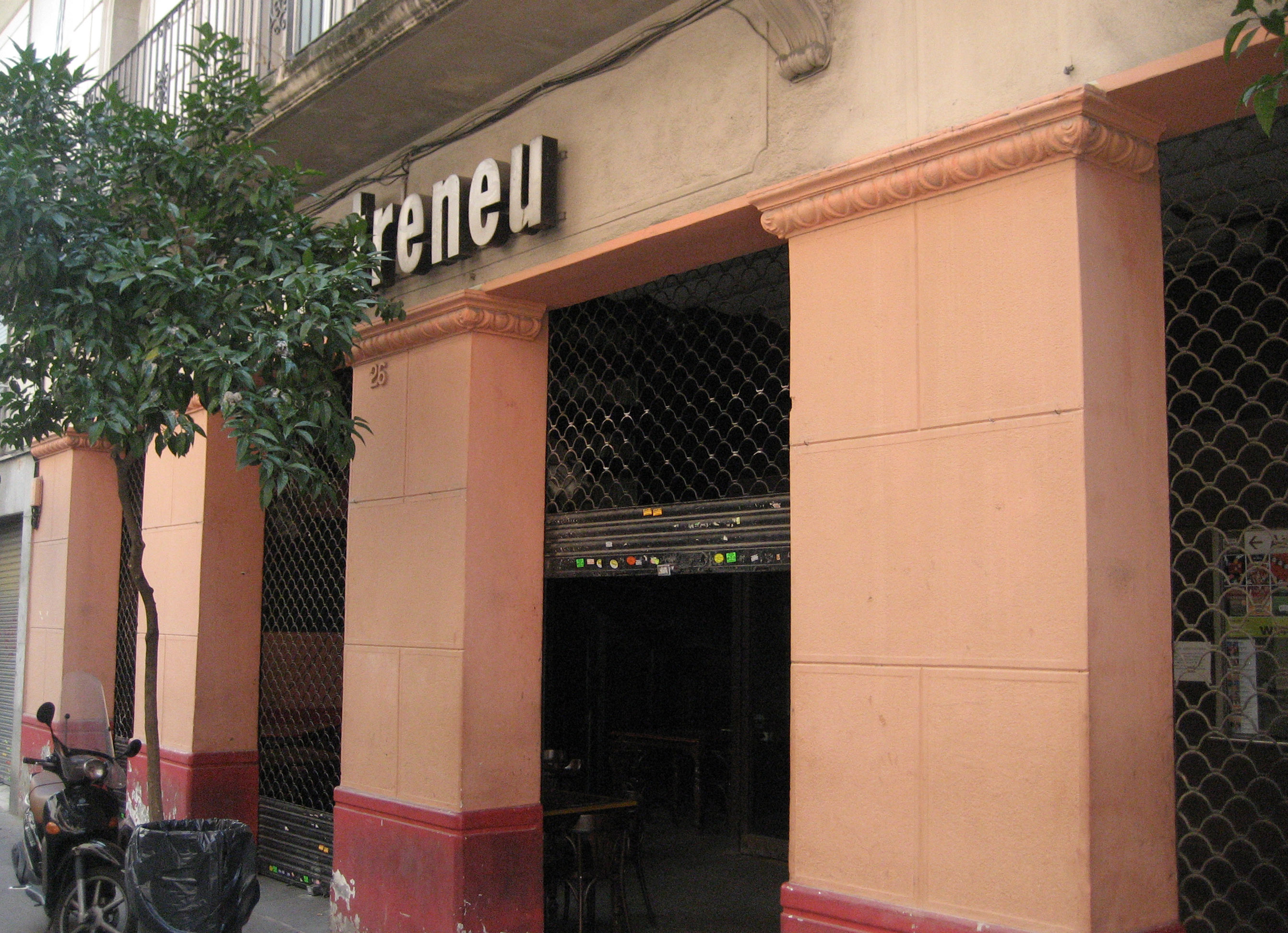 Porta principal d'accés al Teatreneu. Carrer de Terol (Gràcia), Barcelona